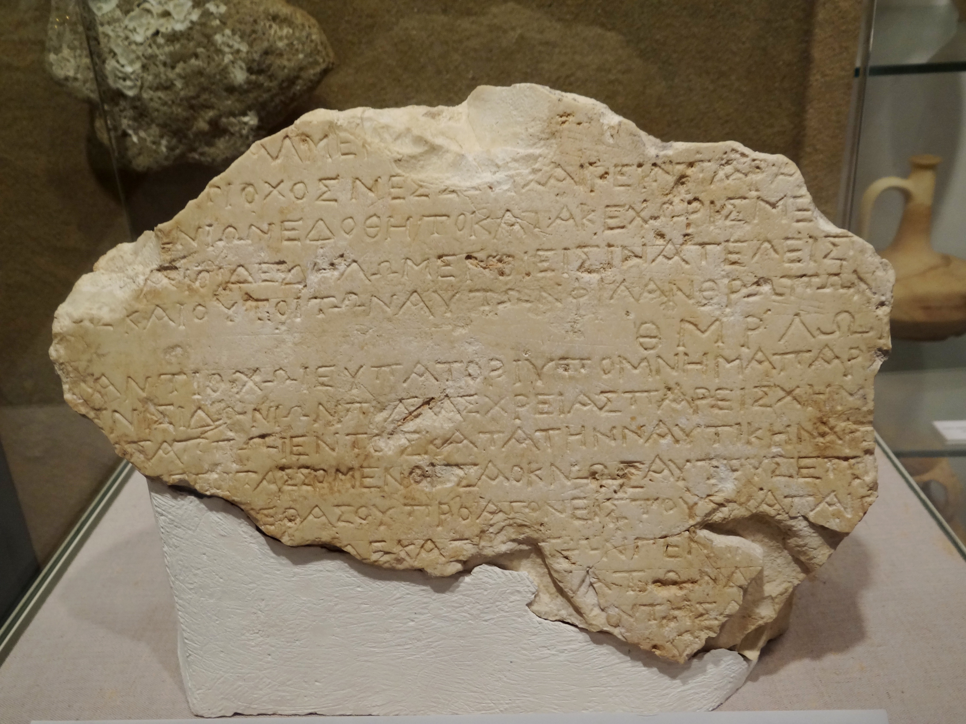 Archaeological Museum Beit Miriam in kibutz Palmahim, Israel מוזיאון בית מרים - הים ומלואו" הוא מוזיאון לארכאולוגיה השוכן בקיבוץ פלמחים מעל מצוק הצופה לים. המוזיאון מתרכז בממצאים ארכאולוגים שנחפרו באזור הקרוב לפלמחים, בחלקו התחתון של ערוץ נחל שורק וממצאים שנמשו מהים בקרבת הקיבוץ. כתובת יבנה ים, כתובת יוונית מתקופת החשמונאים. בכתובת זו החקוקה על אבן גיר קשה, מבקשים הצידונים תושבי יבנה-ים מאנטיוכוס אאופטור בנו של אנטיוכוס אפיפנס "הרשע" שייתן להם הקלות במיסים בגין שירותי הים שנתנו לסבו. הכתובת באה לאשש את המסופר בספר מכבים ב' על הסיוע שנתנו הצידונים לאנטיוכוס השלישי סבו של אאופטור אשר שמו חקוק על האבן.